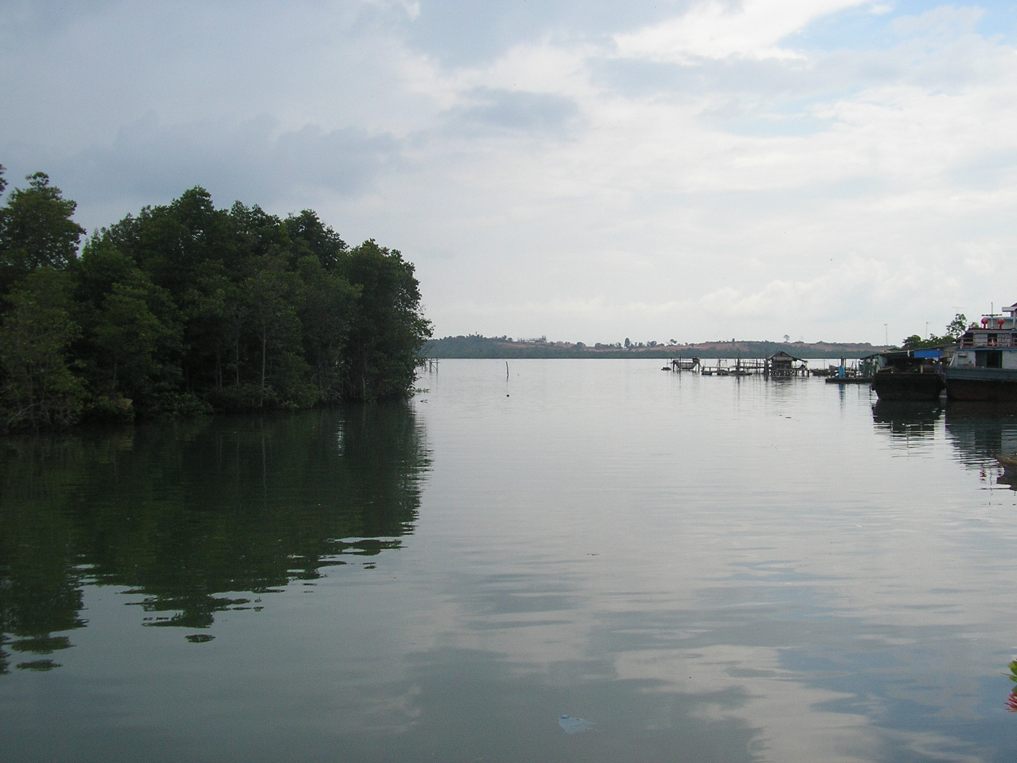 Swamp area in Tanjung Pinang